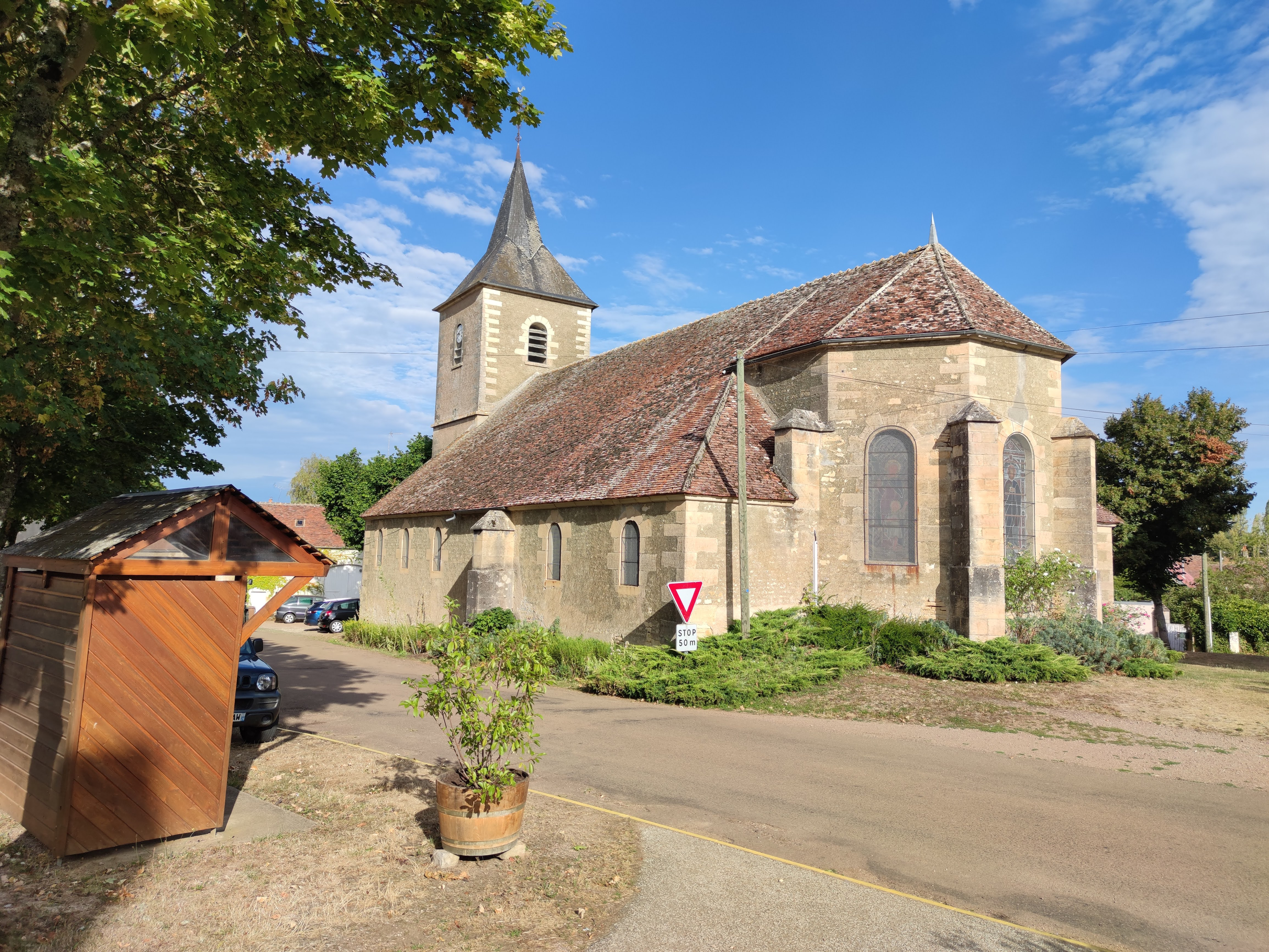 Eglise de Chevannes-Changy (58).